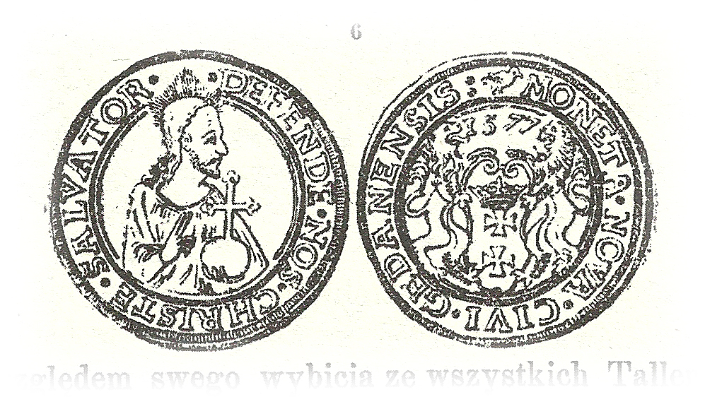 Półtalar_gdański_1577r_Talleman.jpg